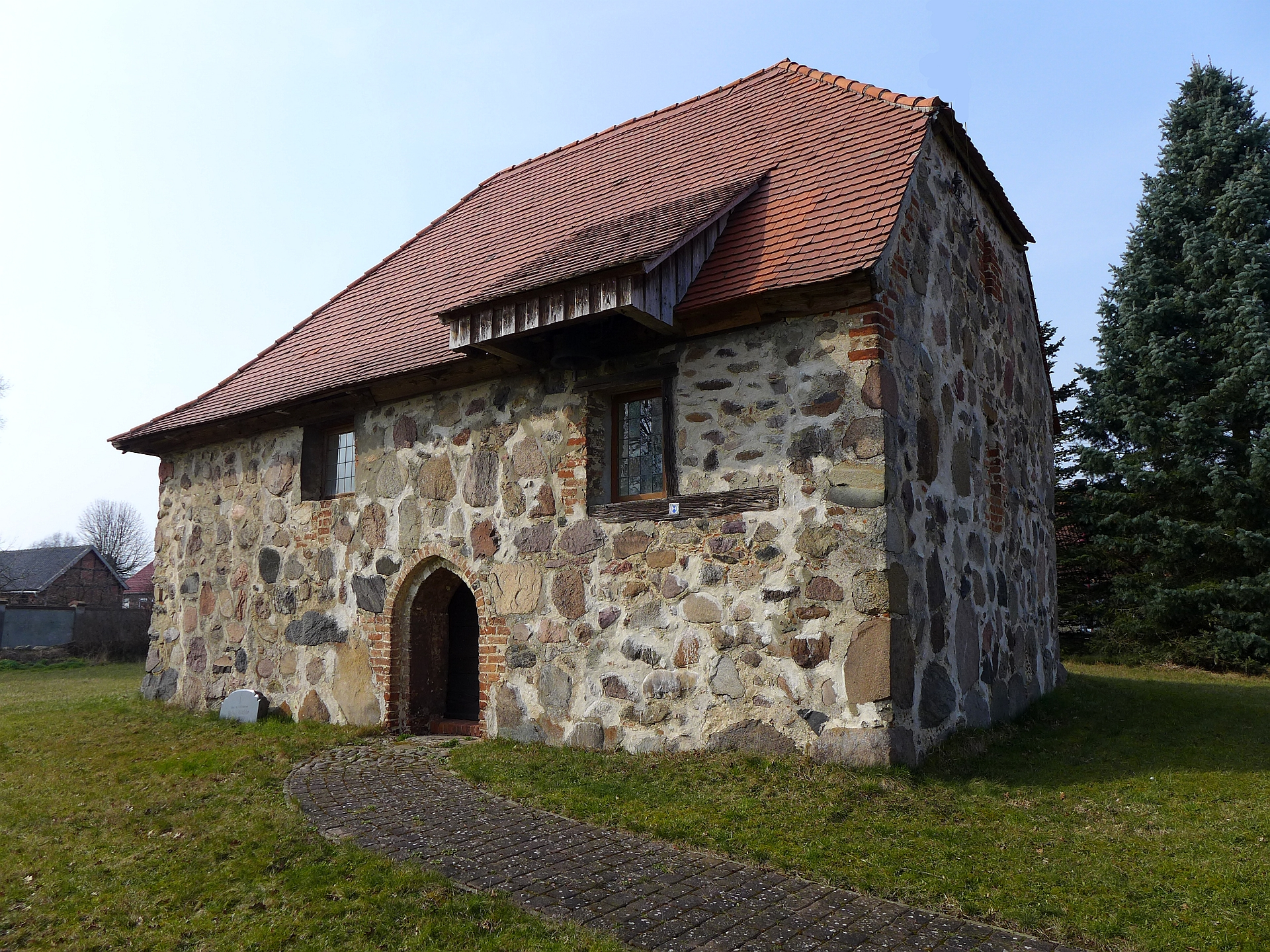 Dülseberg, Ortsteil von Diesdorf (Altmarkkreis Salzwedel). Namenlose Feldsteinkirche (Kulturdenkmal), umgeben von einem planiertem Friedhof. Nach der Wende wurde die Kirche restauriert und unter Denkmalschutz gestellt. Auf dem Kirchhof findet sich nur noch eine Grabstelle mit Grabstein, dessen Vorderseite aber vollständig mit Dornengestrüpp überwuchert ist.